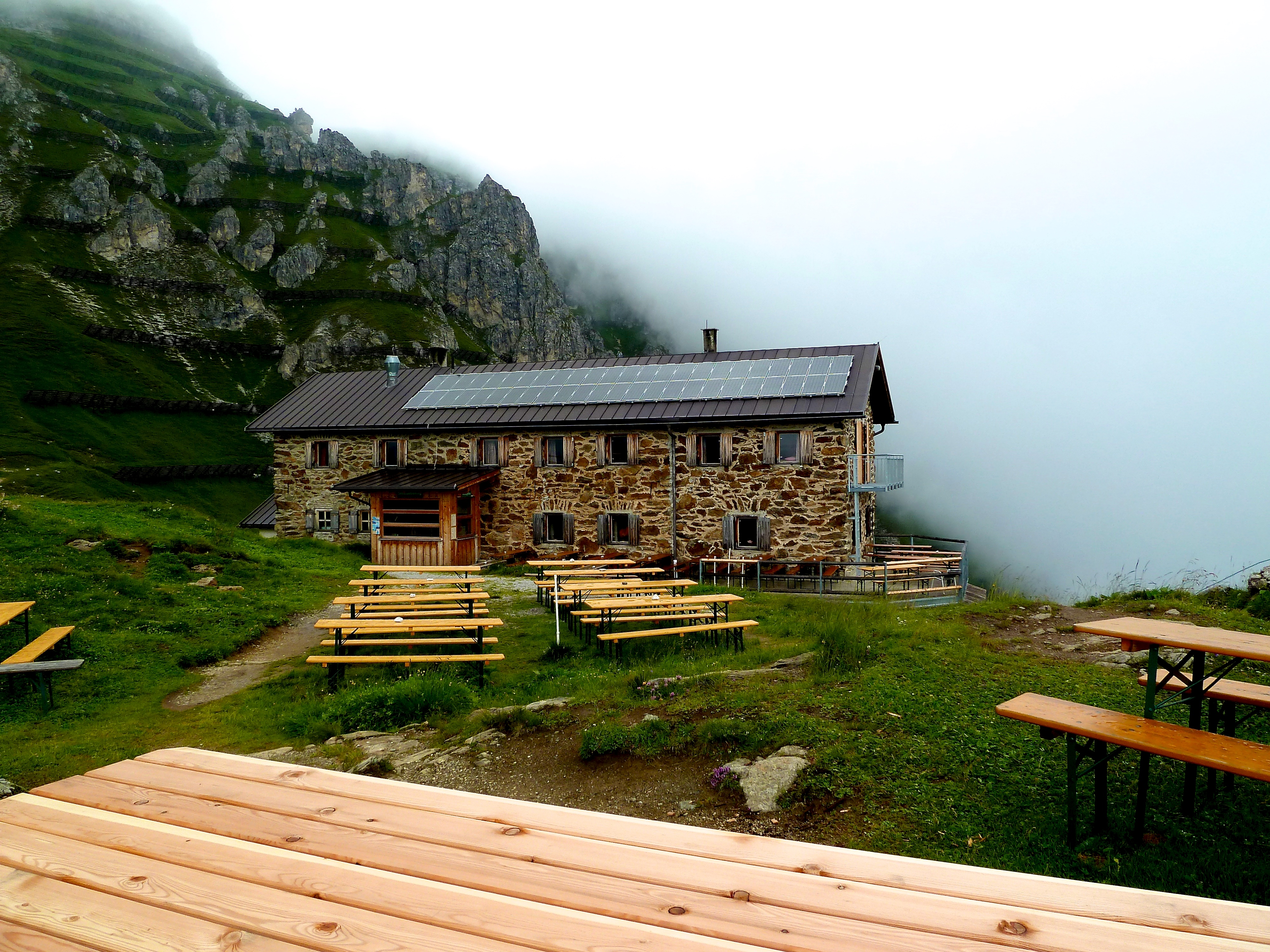 im Sommer